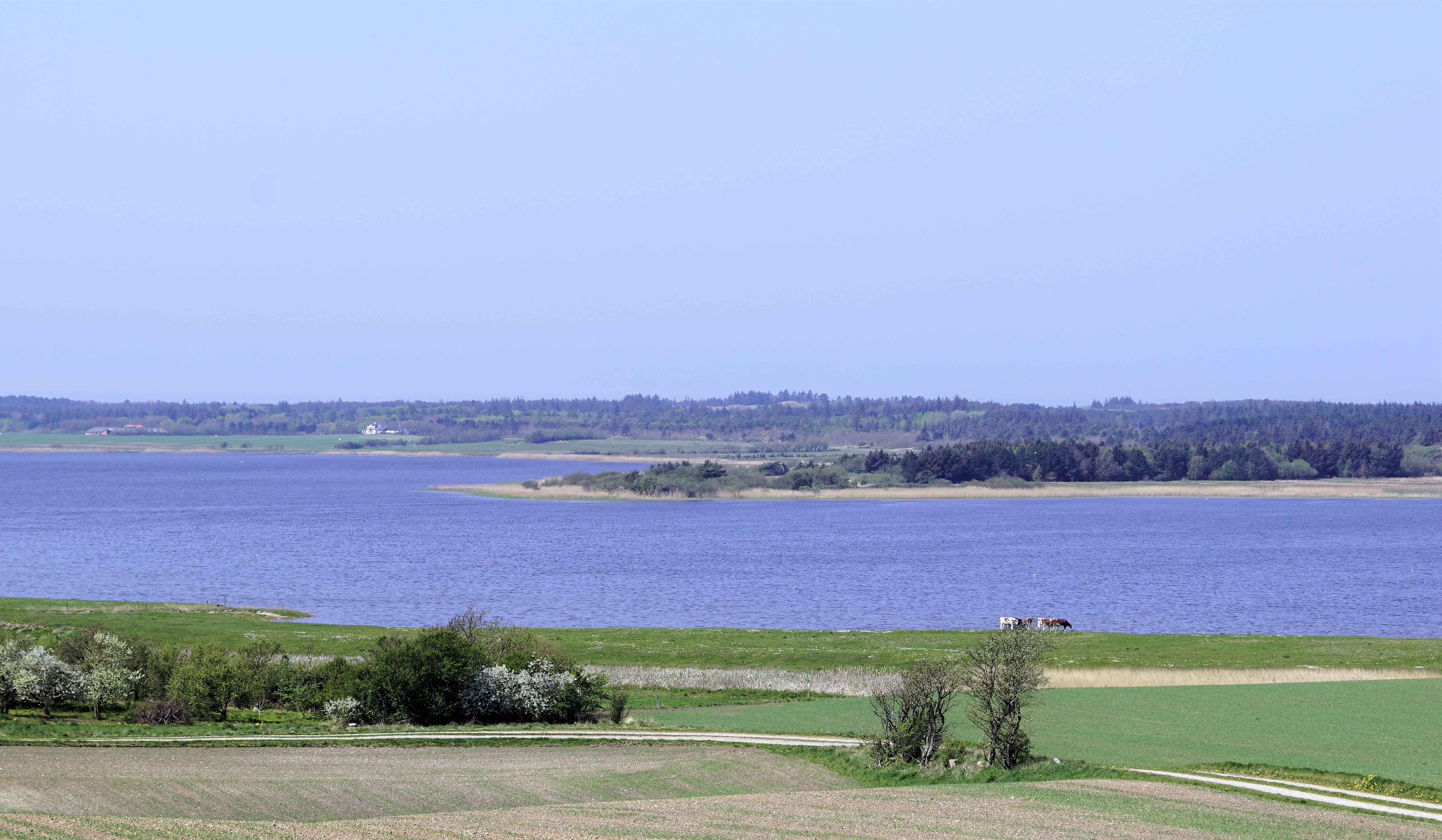 Ørum sø set mod vest